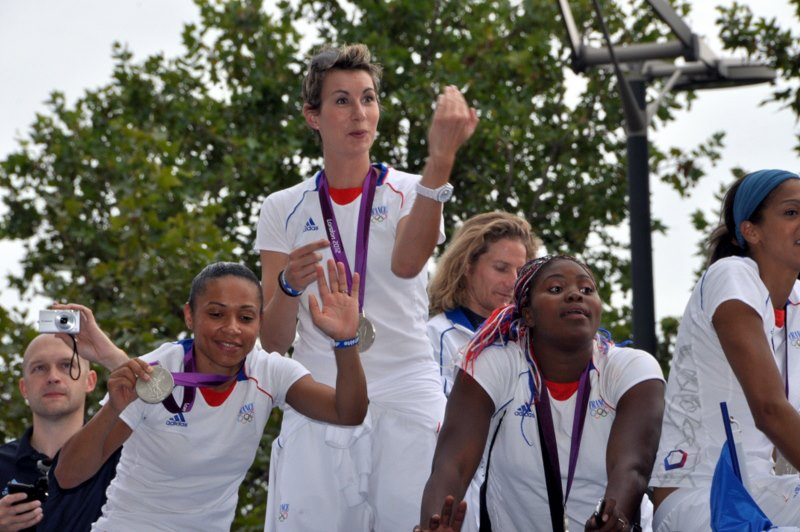 Défilé des médaillés français des JO 2012. De gauche à droite : Edwige Lawson-Wade, Élodie Godin, Isabelle Yacoubou-Dehoui